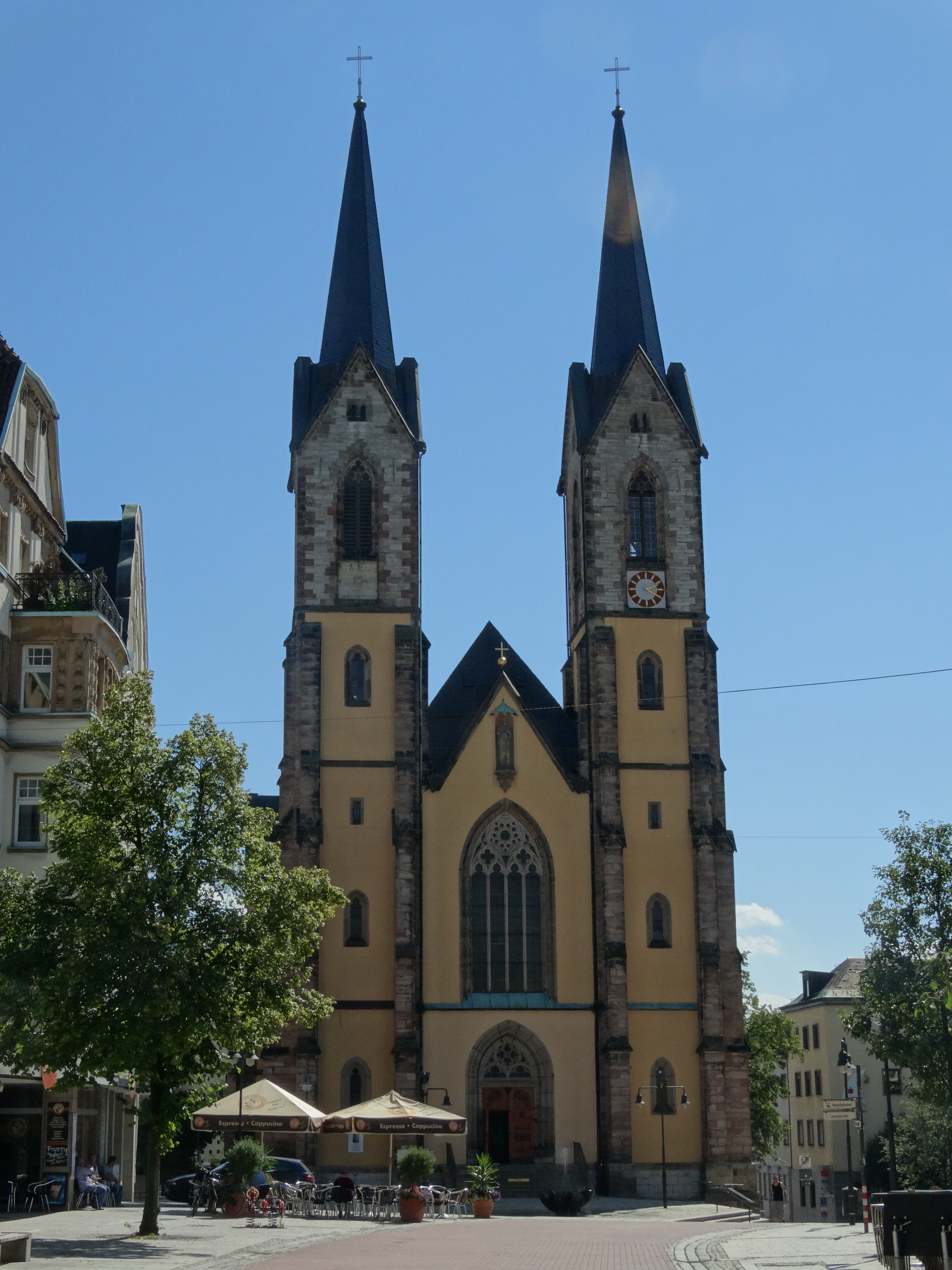 St. Marienkirche Ansicht aus der Fußgängerzone